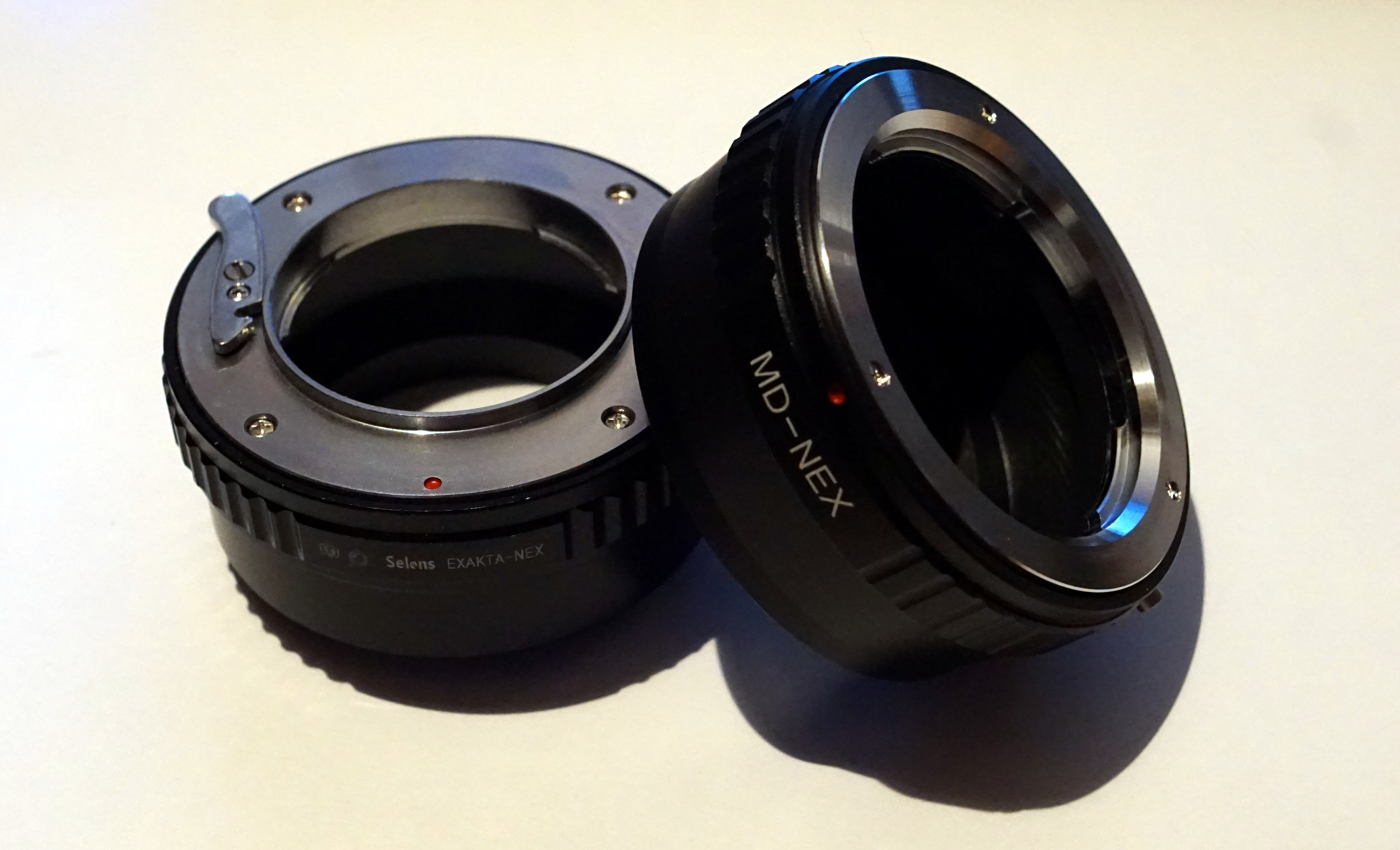 Zwei Objektiv-Adapter: Mit dem linken kann man Objektive mit Exakta-Bajonett auf Sony-E-mount-Kameras befestigen. Mit dem rechten Objektive mit Minolta-MD-Bajonett.